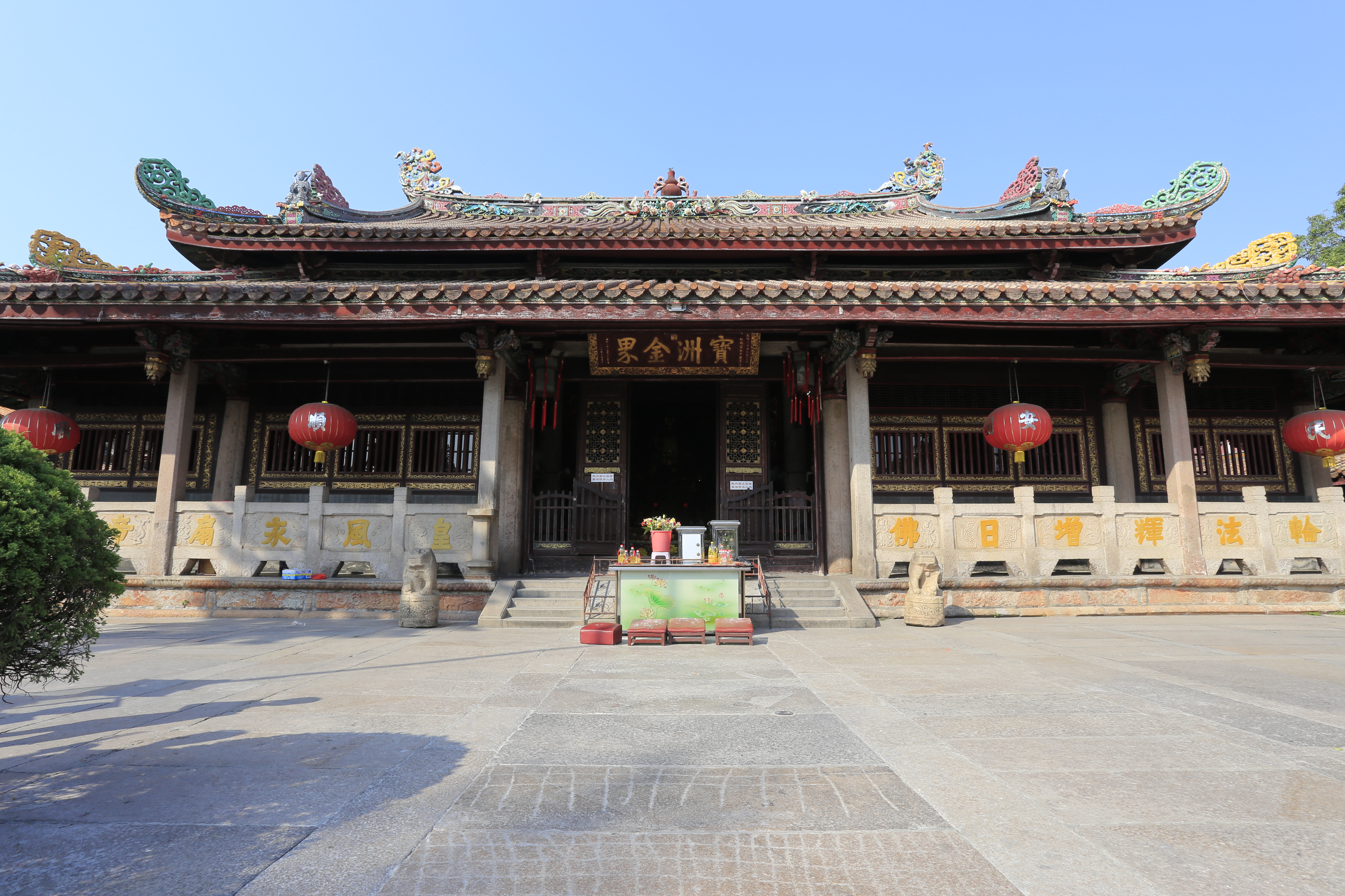 潮州开元寺 大雄宝殿